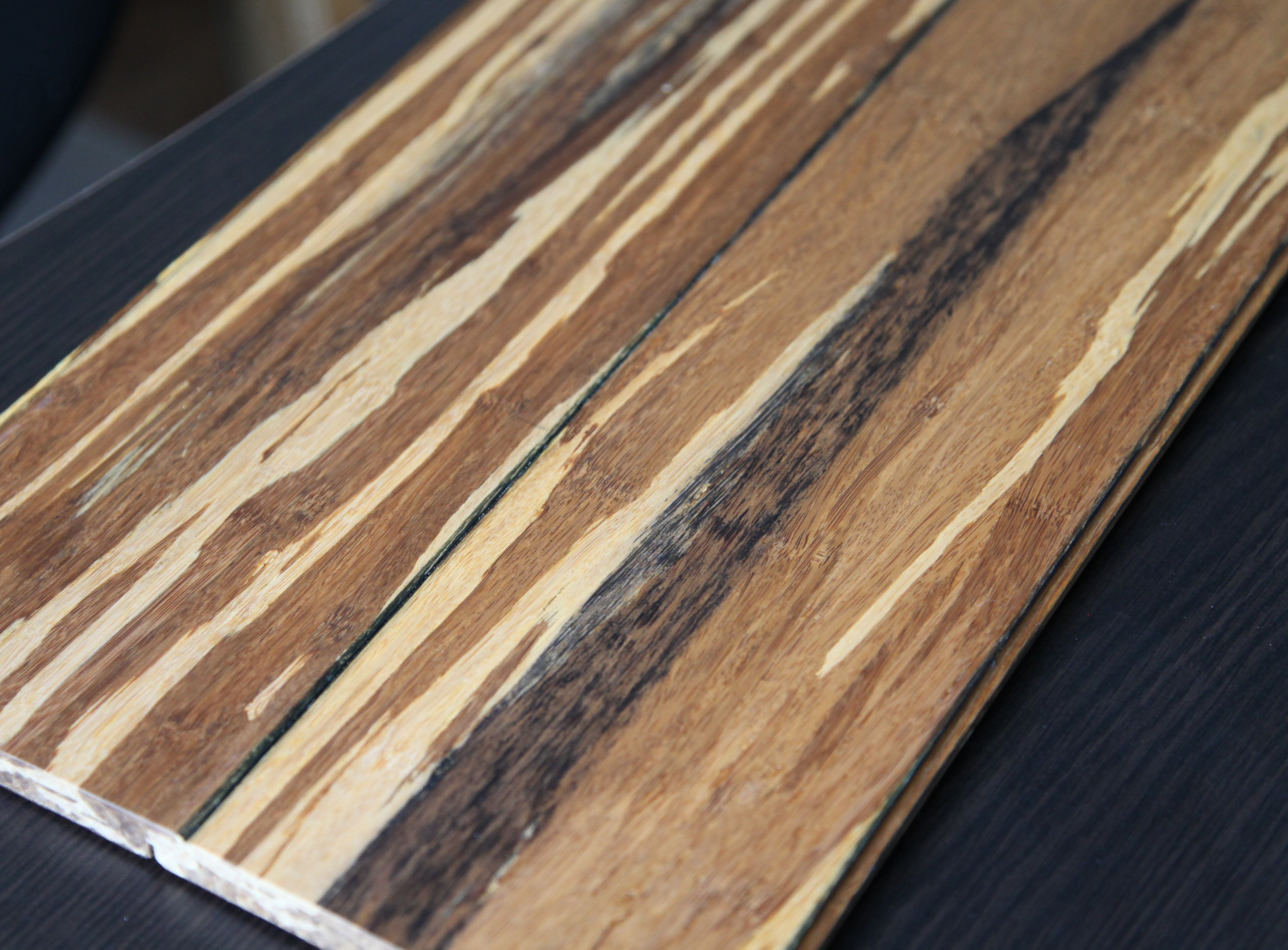 Бамбук прессованный. Волокна разного цвета, торцевой замок срезан